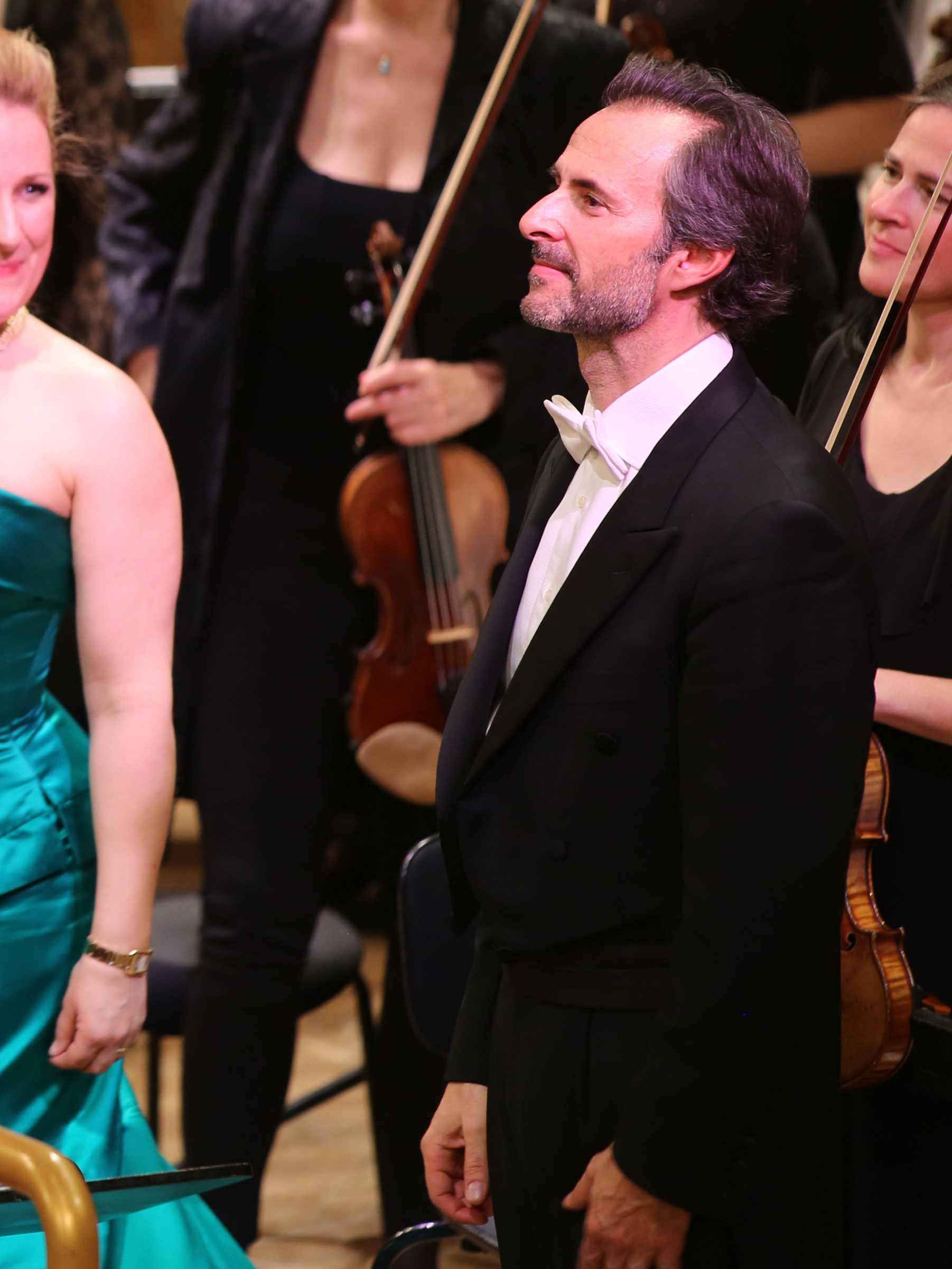 David Gimenez, Dirigent